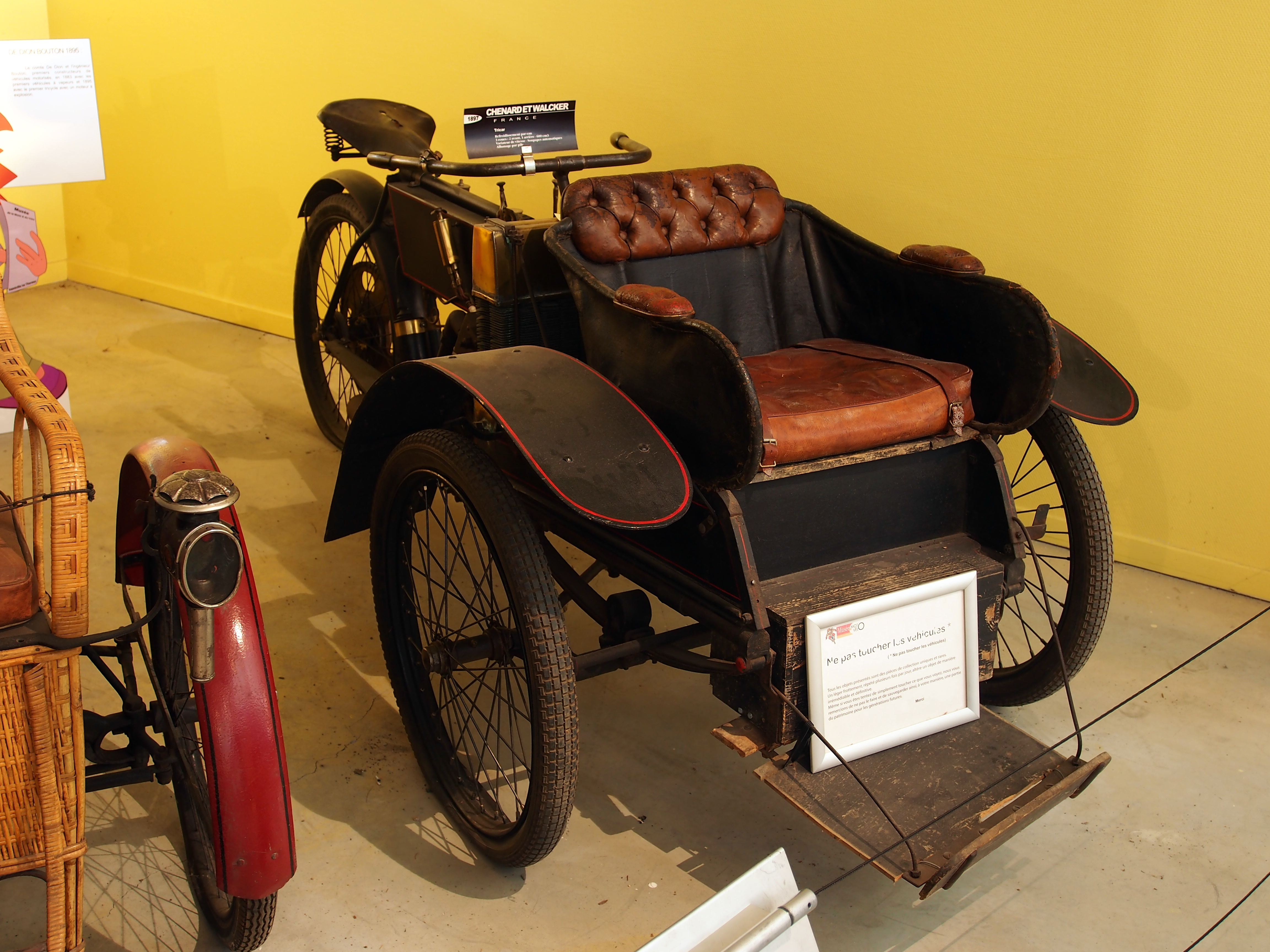 Photographed at the Musée de la Moto et du Vélo, Amneville, France.